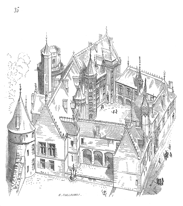 ... Nous présentons (35) une vue cavalière de cet hôtel, prise du point P' (voir le plan du rez-de-chaussée). La construction est partout traitée avec un soin extrême et la sculpture d'un charmant style, appropriée à chacun des services, entremêlée d'emblèmes, de devises, de cœurs, de plumes et de coquilles. Ainsi, au-dessus des trois baies de l'escalier de la chapelle, dans les tympans, le sculpteur a placé un prêtre revêtu de l'aube, se disposant à la bénédiction de l'eau; derrière lui un jeune clerc sonne la messe; puis vient un mendiant, appuyé sur une béquille, comme pour indiquer que le lieu saint est accessible à tous. Le second bas-relief représente des clercs préparant l'autel. Le troisième, des femmes qui arrivent à l'office, précédées d'un enfant qui ouvre une porte. En haut de l'escalier est un quatrième bas-relief représentant le Père Éternel avec deux anges en adoration. Au-dessus de la porte de l'escalier, côté des cuisines, est sculptée une large cheminée devant laquelle pend un coquemard; un enfant tourne la broche, une femme lave des plats, et un cuisinier pile des épices dans un mortier .la facade de l'hotel jacques coeur représente une enluminure d'une rue commerciale au temp de jeanne d'arc.